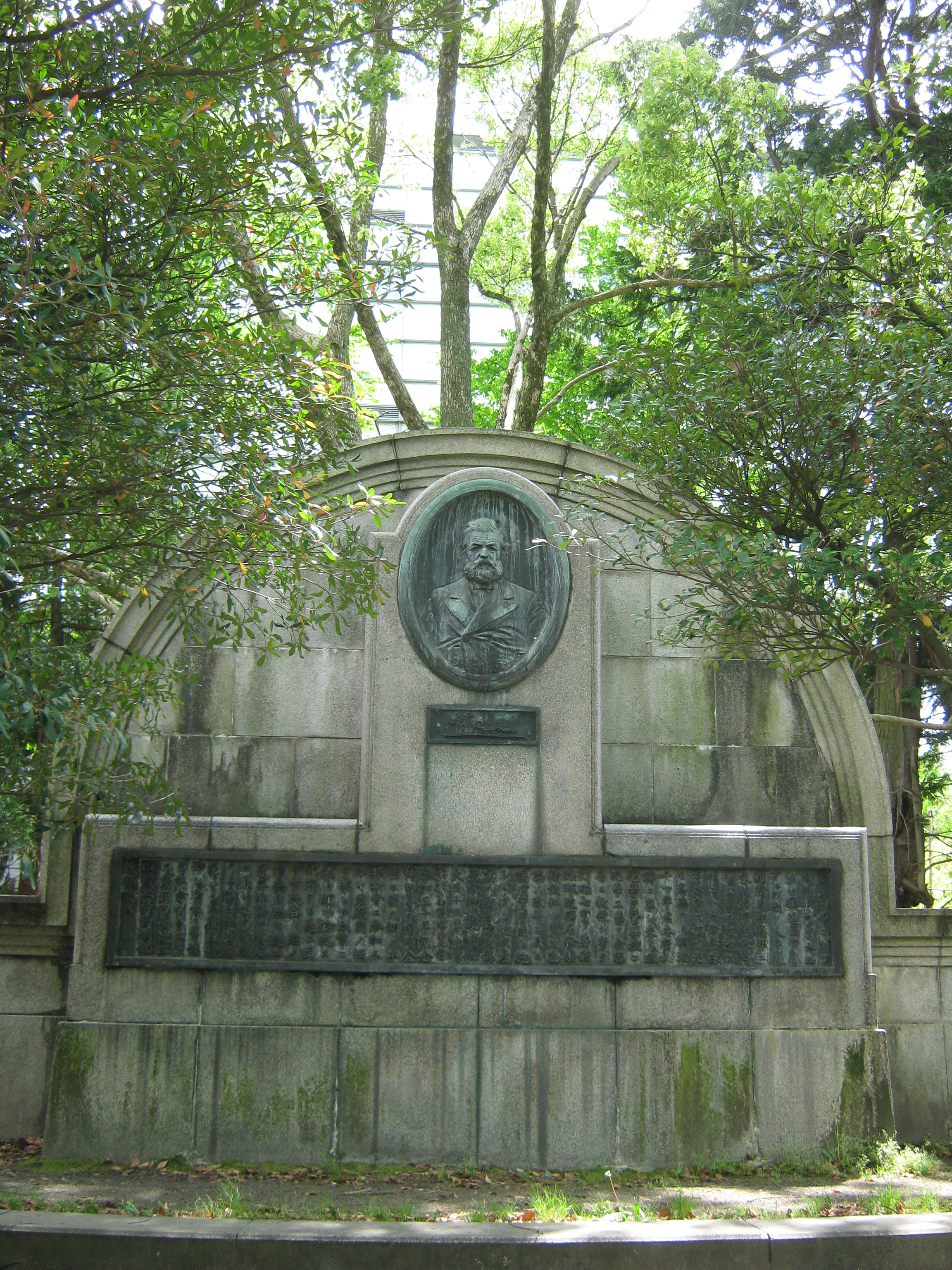 Denkmal für Gottfried Wagener im Okazaki Park in Kyoto